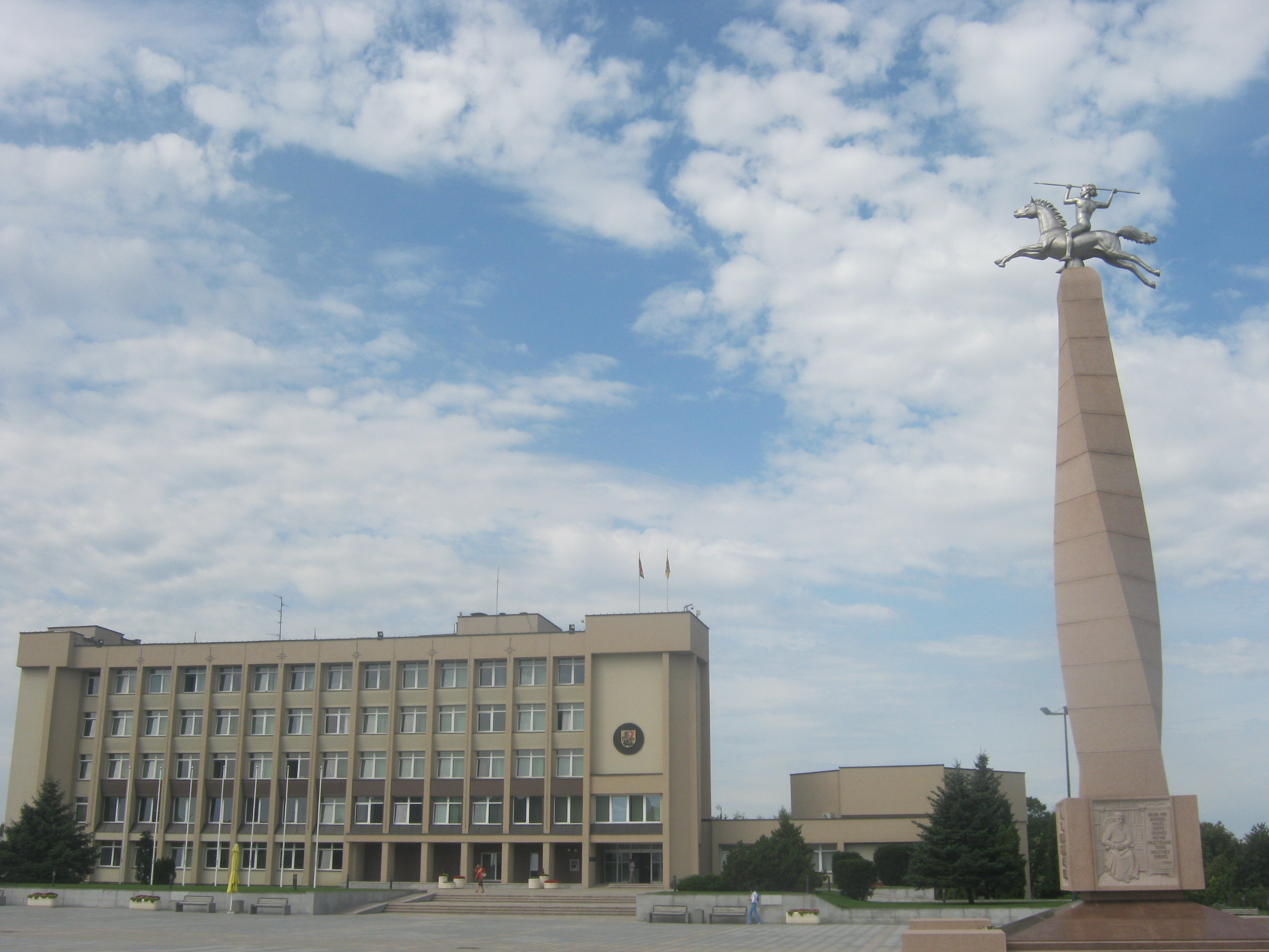 Marijampolė